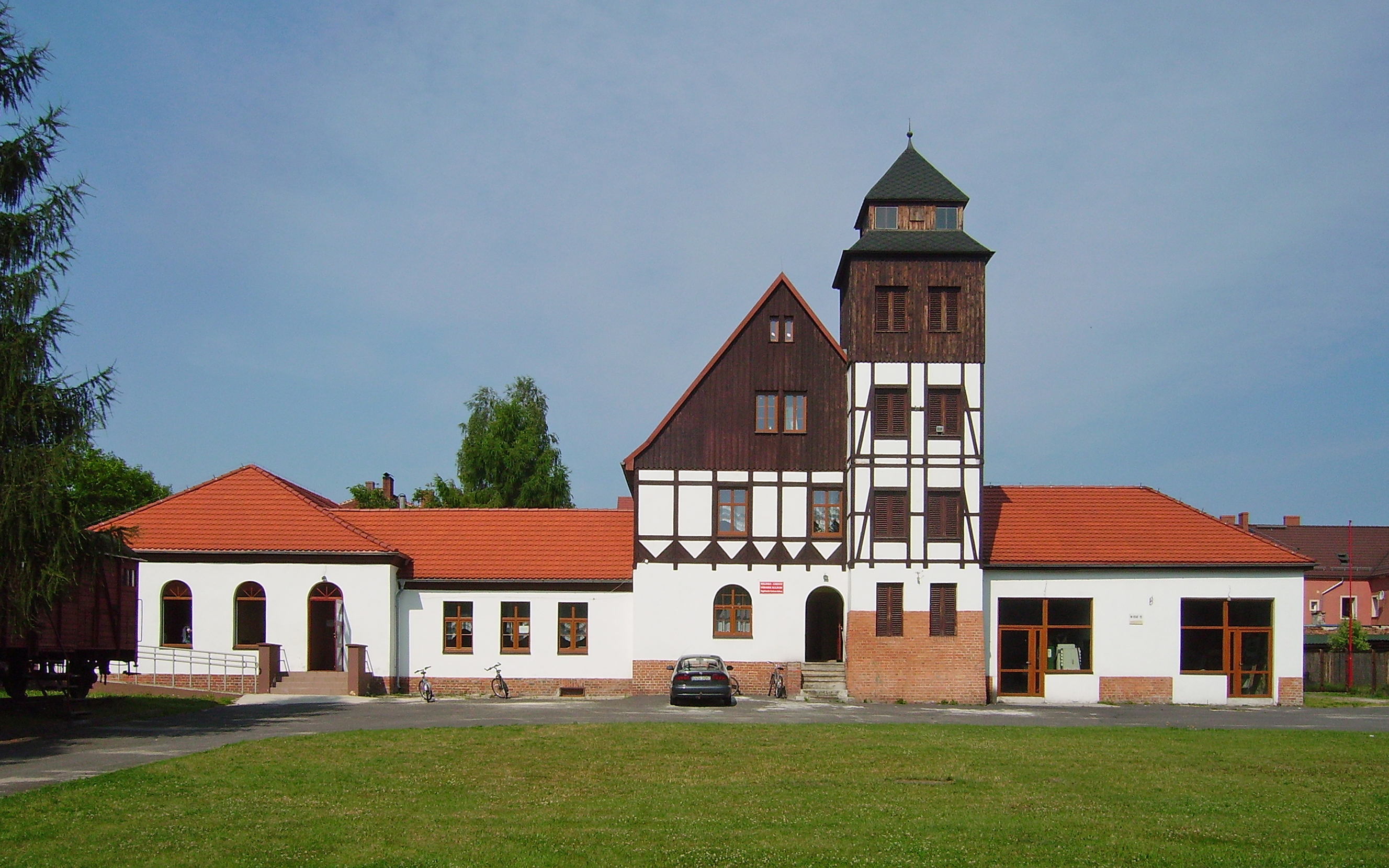 budynek byłej remizy OSP Węgliniec obecnie Węglinieckie Centrum Kultury